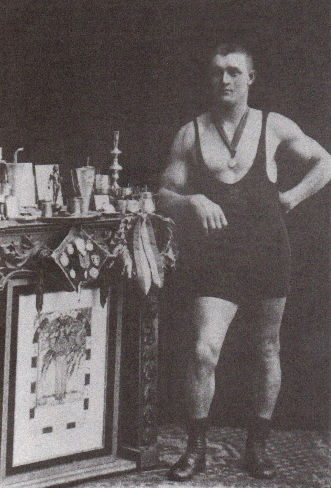 Kaarlo Koskelo